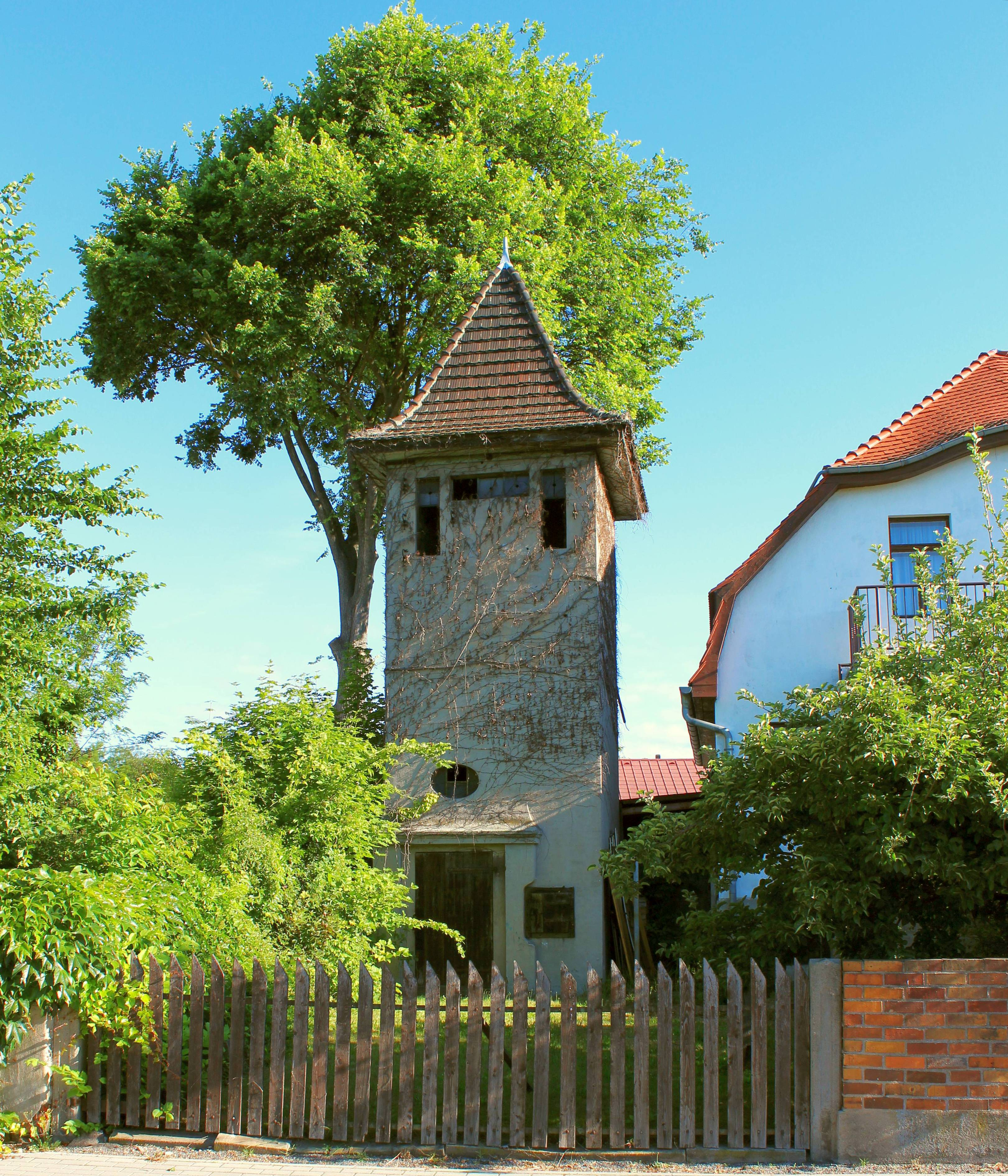 Transformatorenstation in Elsterwerda-Biehla